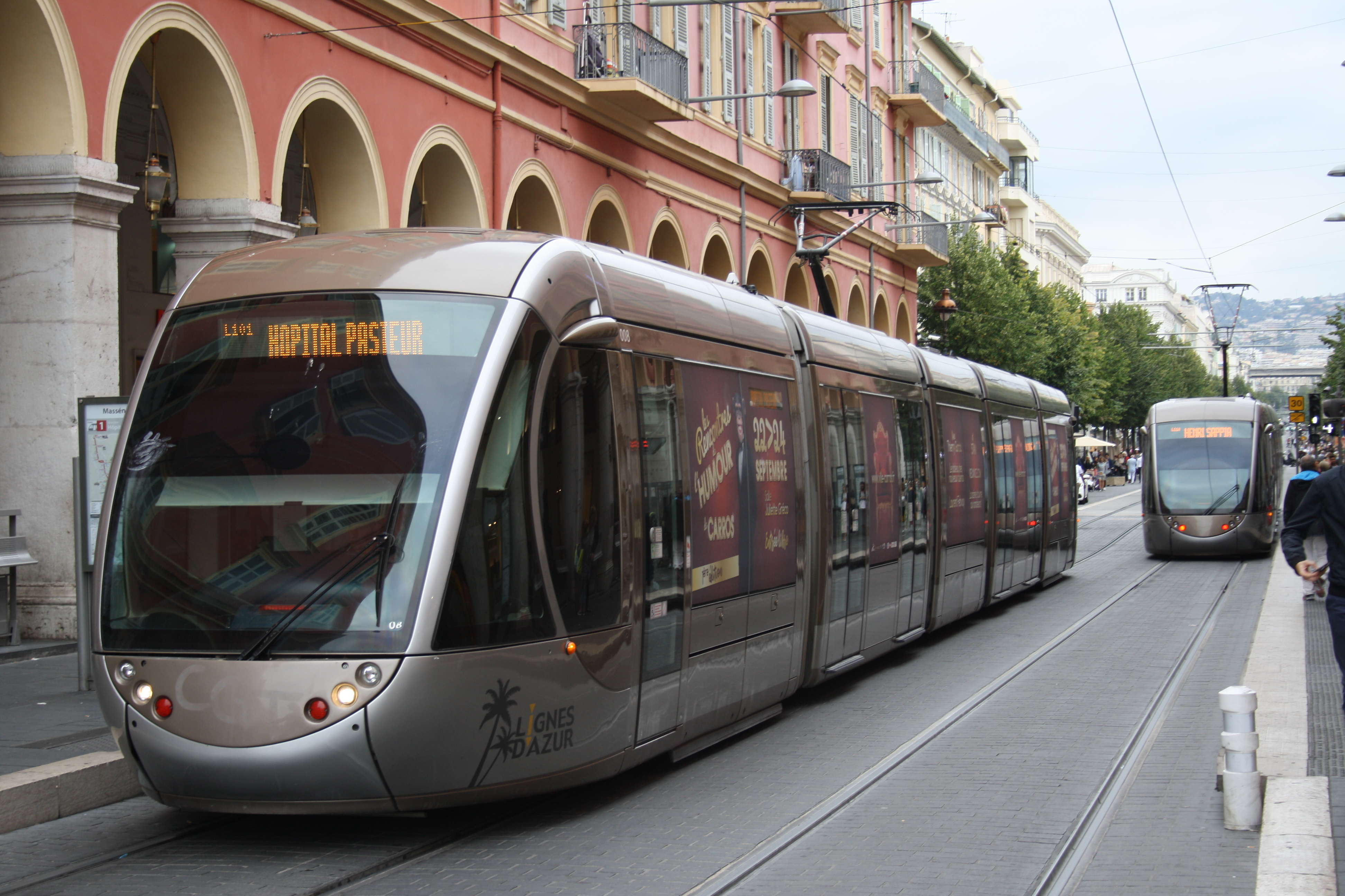 Straßenbahn Nizza, Systemwechselstelle Masséna